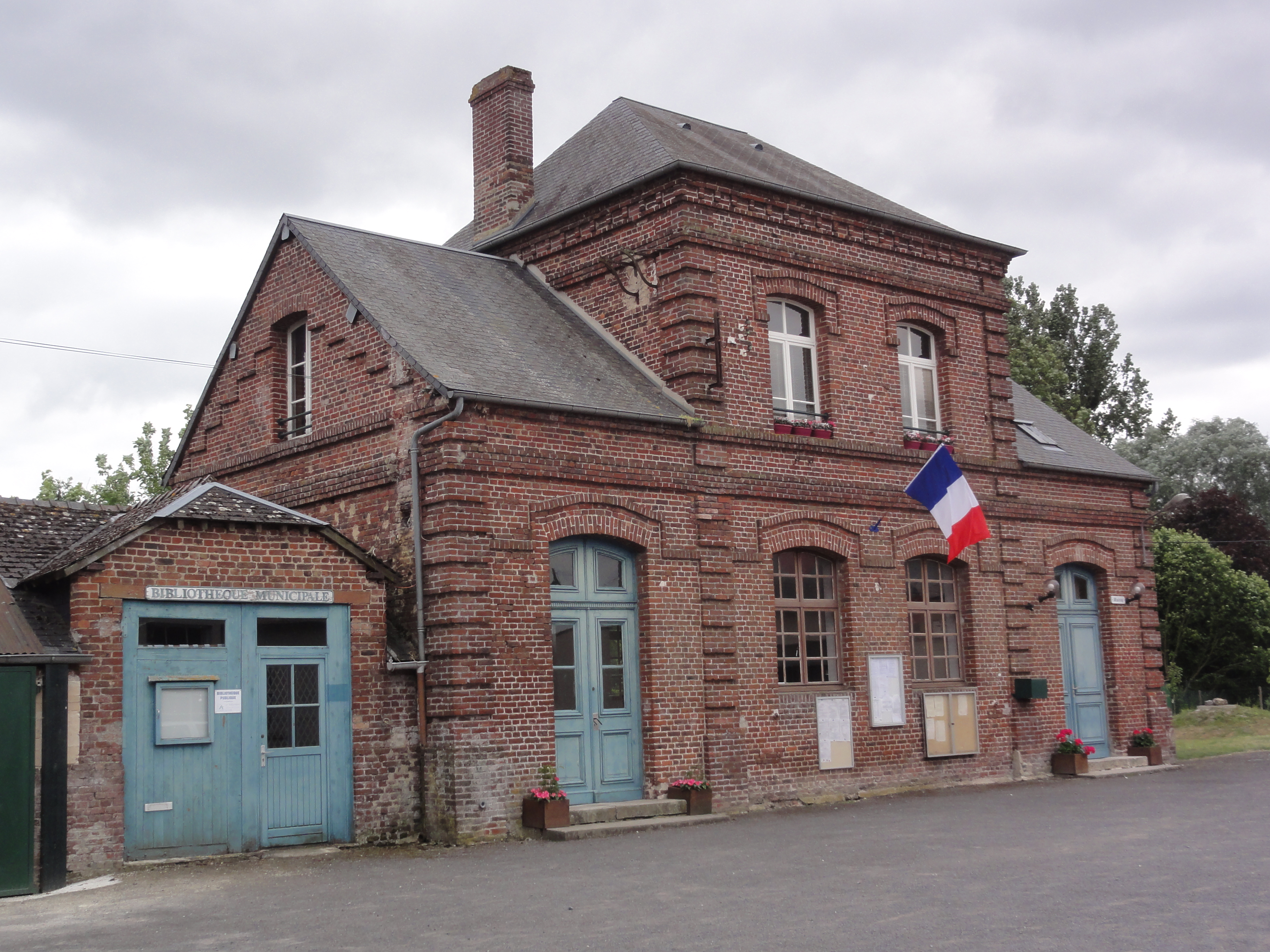 Vesles-et-Caumont (Aisne) mairie